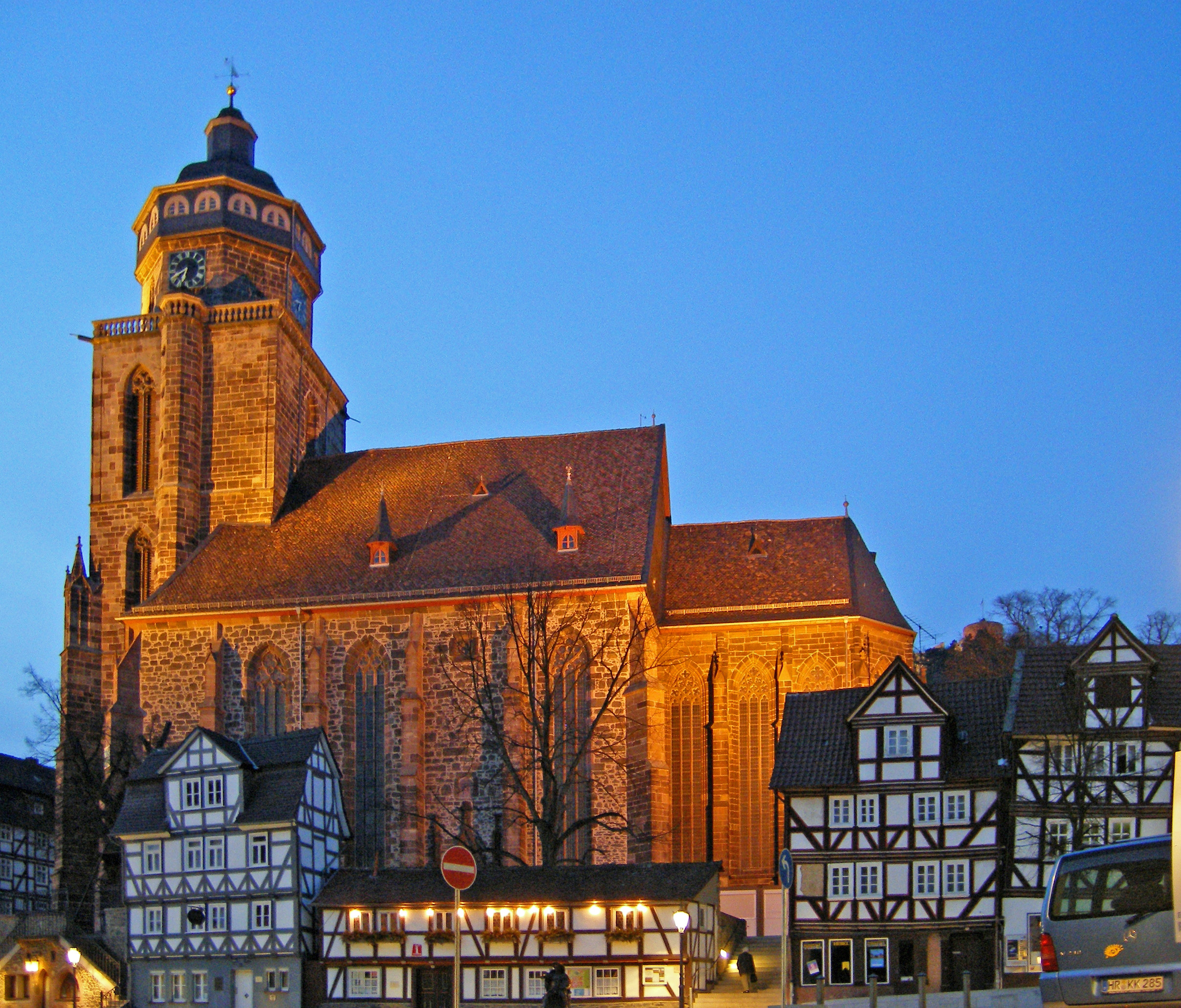 Die Marienkirche am Abend